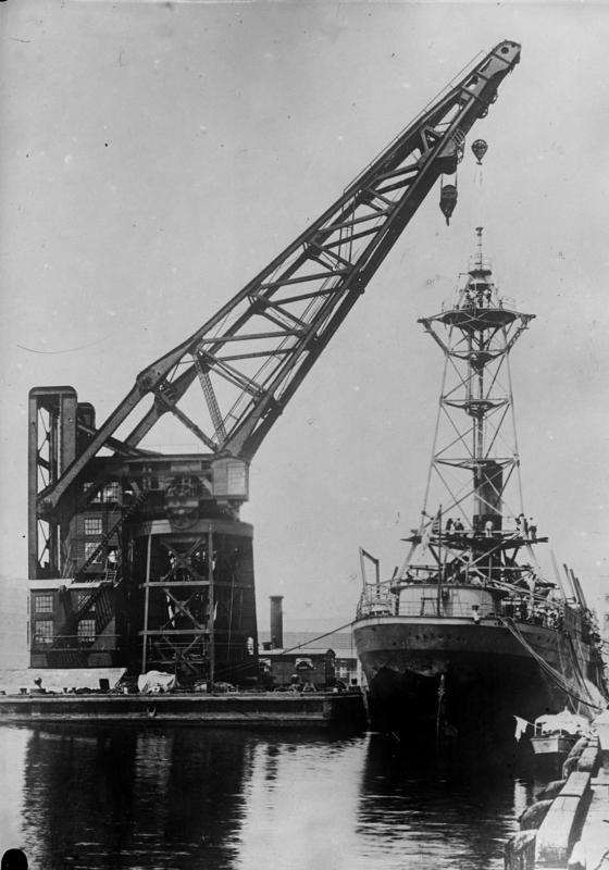 Das amerikanische Zeppelin-Ankerschiff "Patocka" in Reparatur im Hafen von Boston! Das grösste amerikanische Zeppelin-Ankerschiff "Patocka" wird im Hafen von Boston einer gründlichen Renovierung unterzogen.